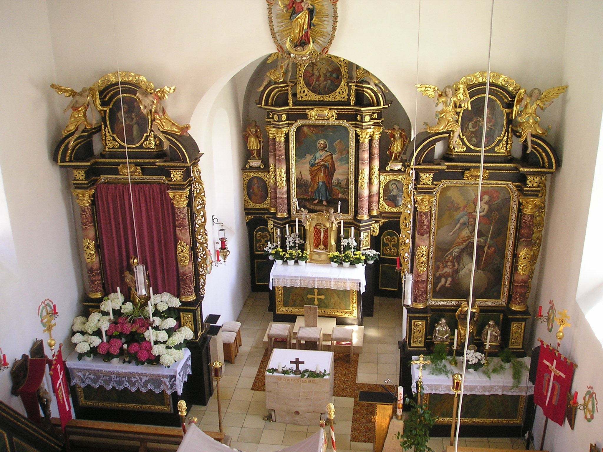 Petersbuch im Landkreis Eichstätt, barocke Kirchenausstattung